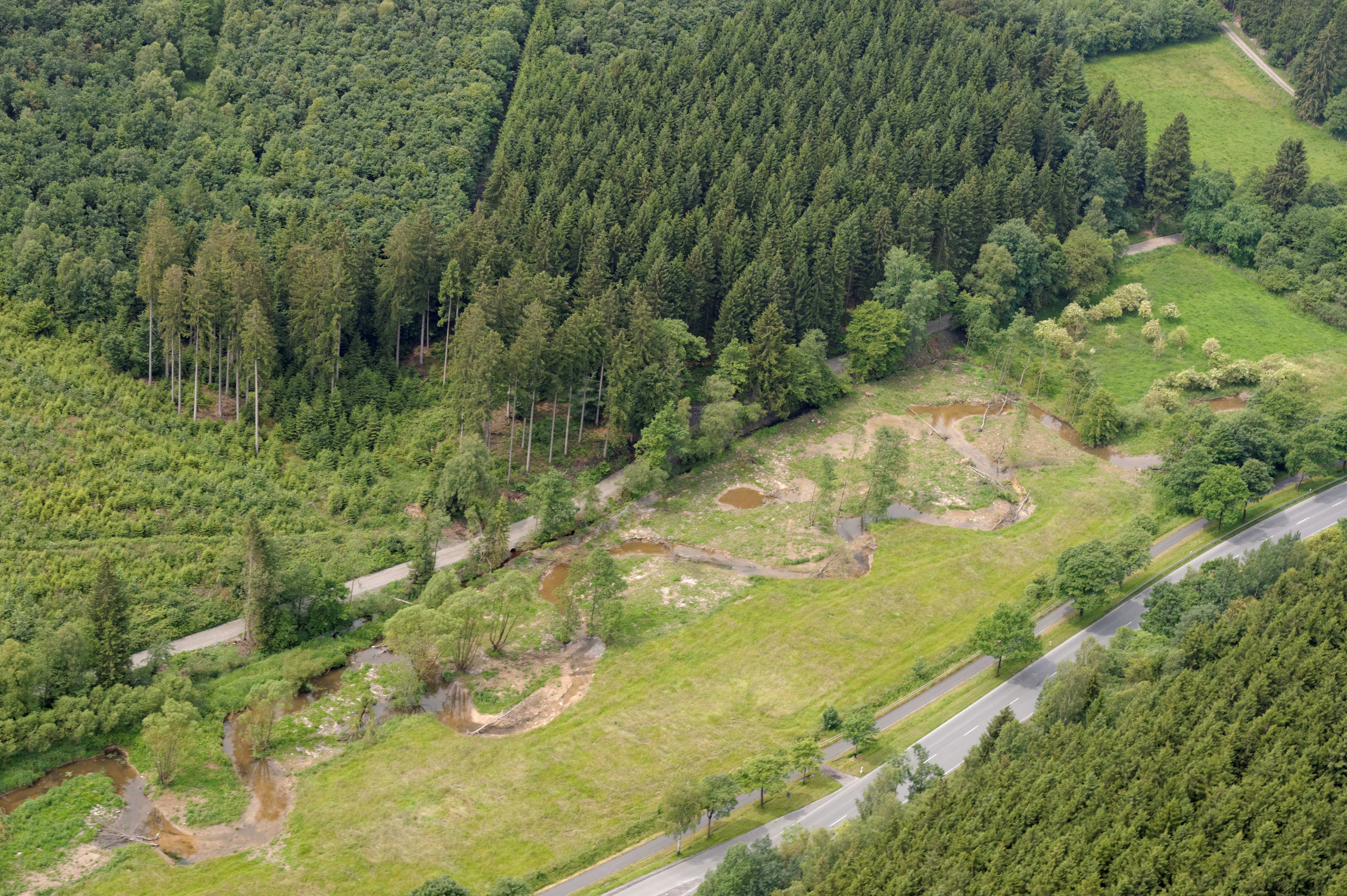 Fotoflug Sauerland-Nord. Renaturierte Möhne im Naturschutzgebiet Oberes Möhnetal (HSK-482), Bundesstraße 516, Möhnetalradweg, Blickrichtung West. Die Steinbecke (Möhne) mündet am rechten Bildrand in die Möhne, was durch Baume auf dem Bild nicht zu sehen ist. The making of this document was supported by the Community-Budget of Wikimedia Germany.